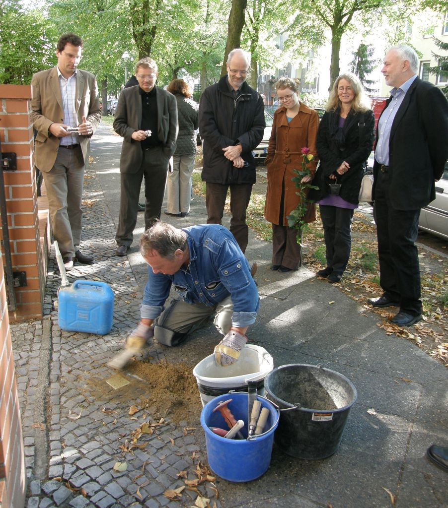 Gunter Demnig bei der Verlegung eines Stolpersteines für Dr. Robert Remak, Manteuffelstraße 22a, Berlin-Lichterfelde